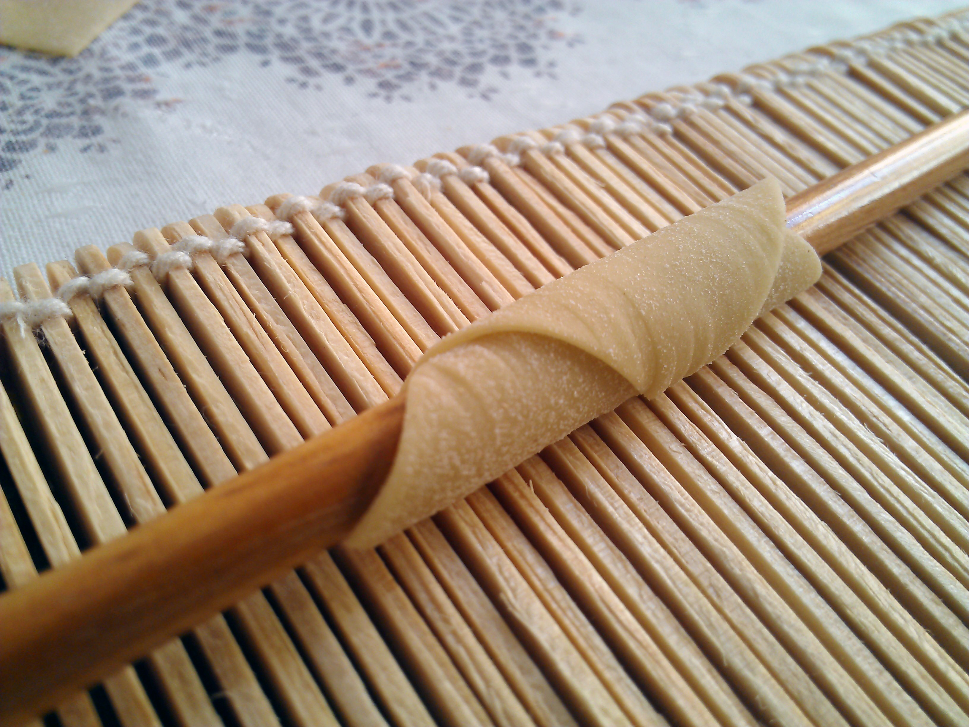 Garganelli sendo feito a mão, com uma base própria para este fim.